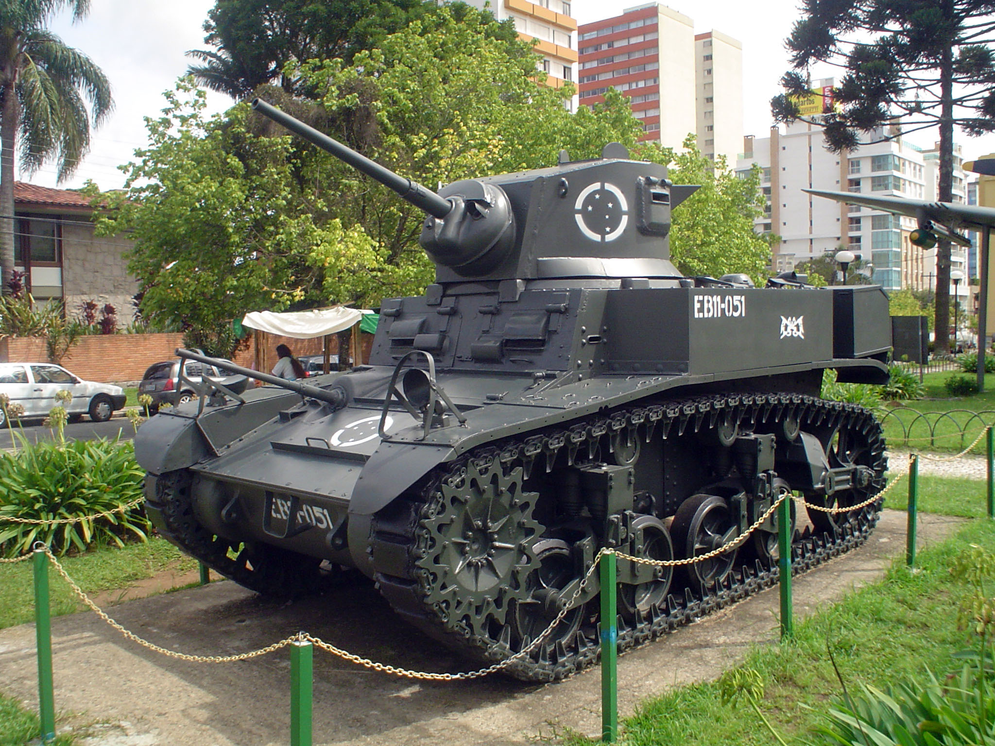 Tanque no pátio do Museu do Expedicionário. Curitiba - PR